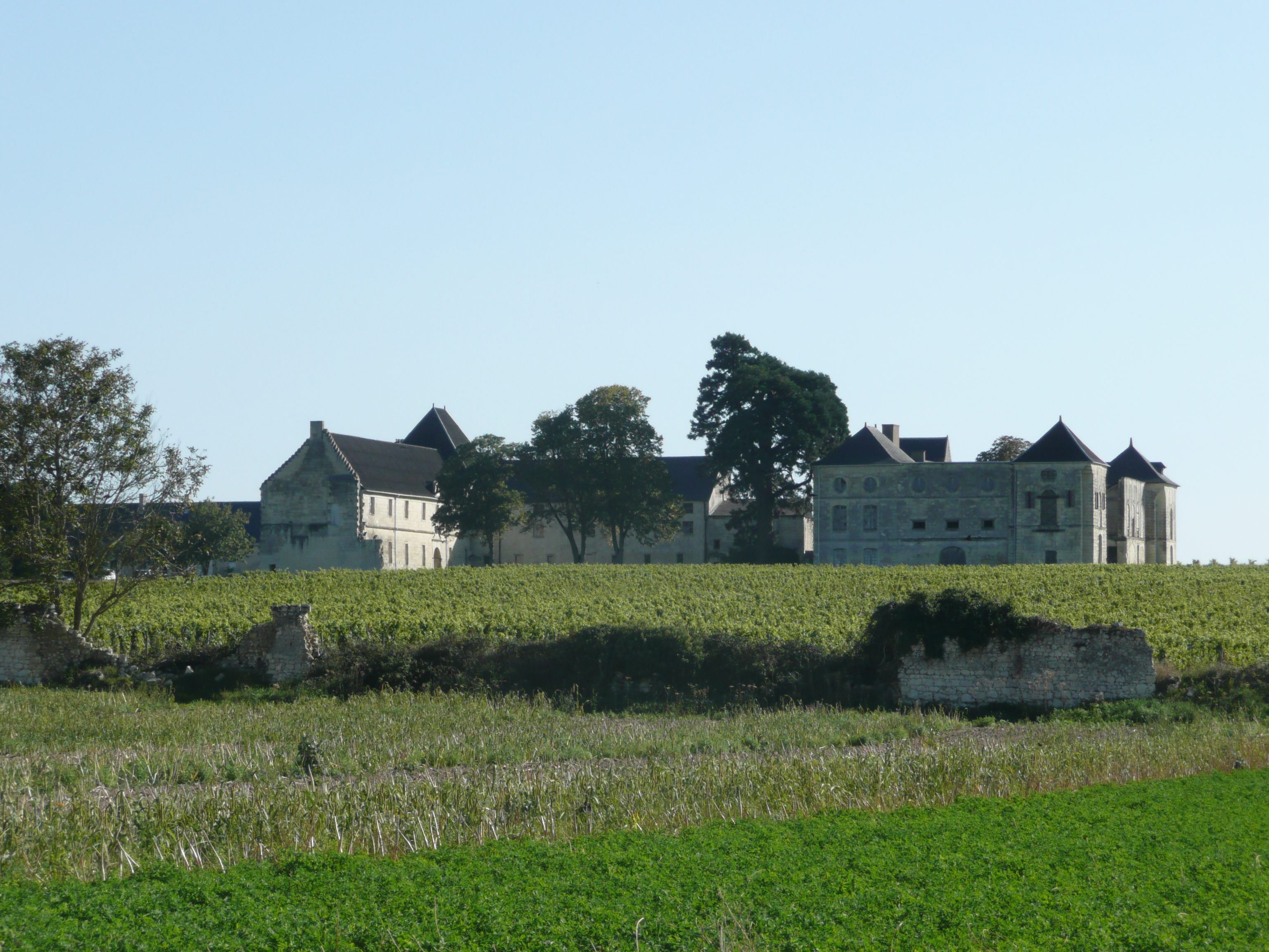 Grézillé - Château .